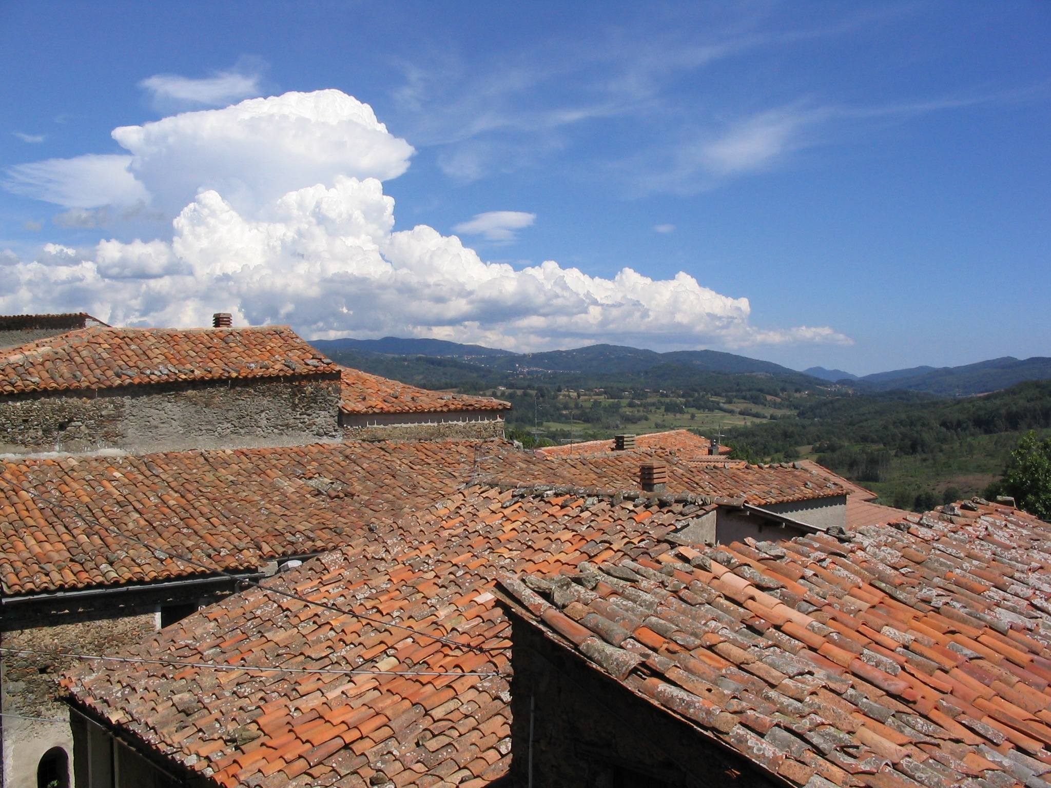 Adami, Roofs